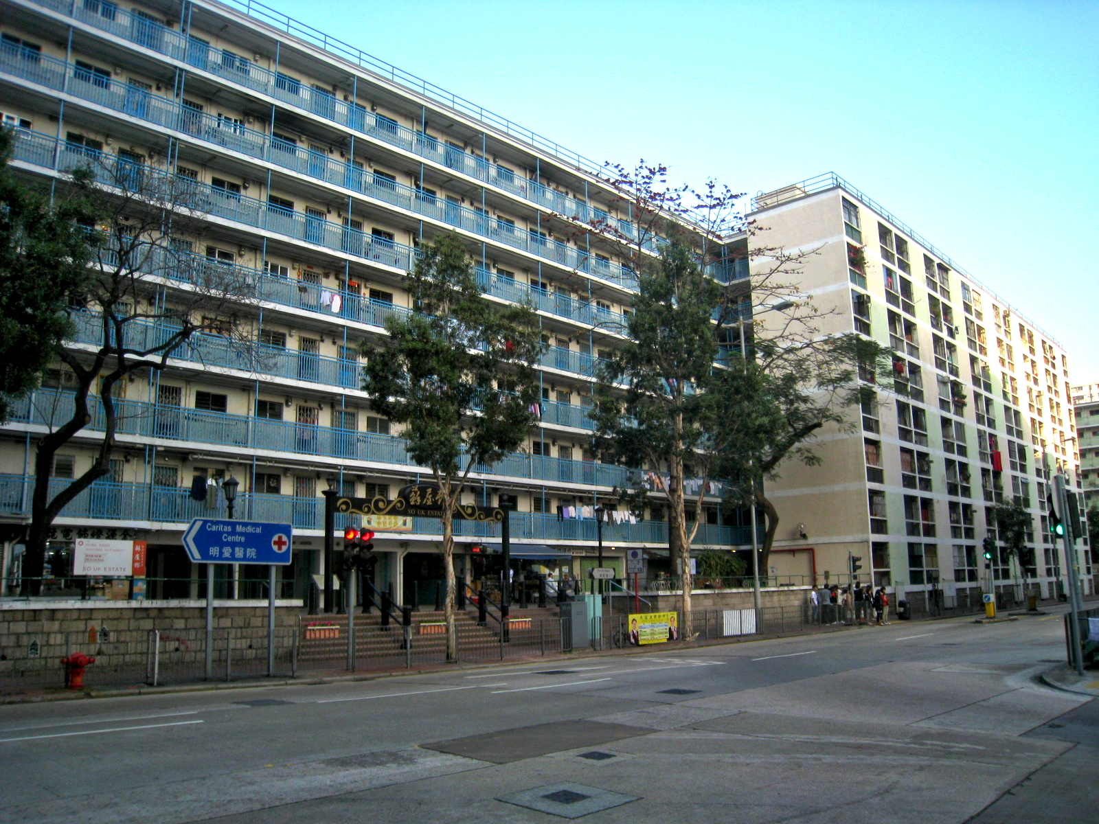 So Uk Estate 蘇屋邨